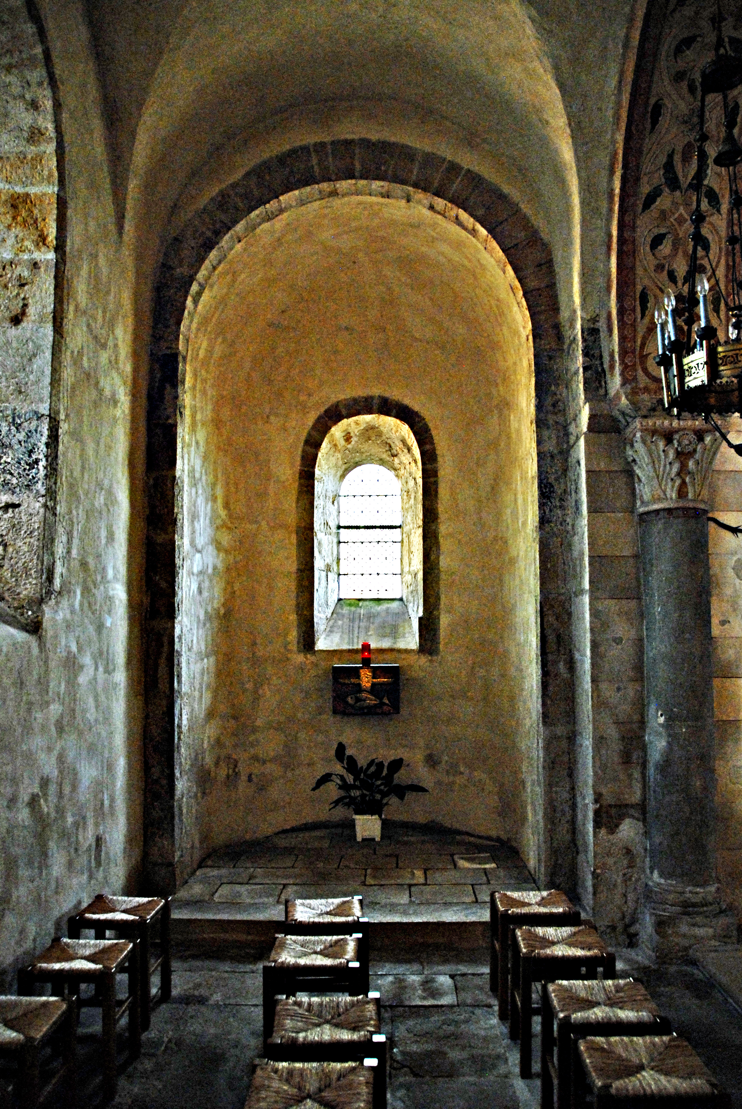 St-André d'Iguerande, nordwestliche Querhauskapelle